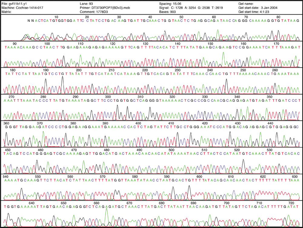 DNA sequencing, interferogram